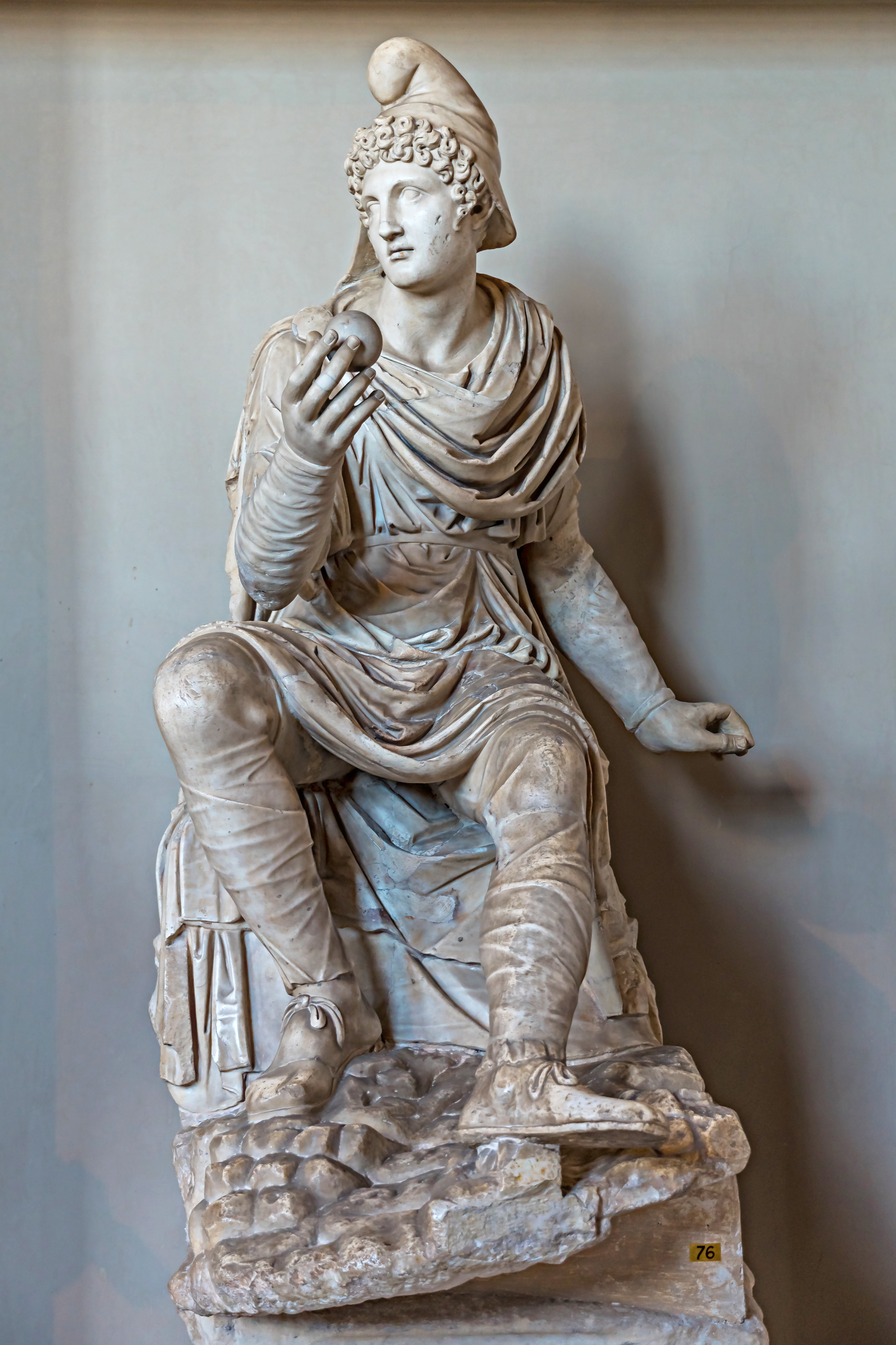 Römische Statue aus der Mitte des 2. Jahrhunderts. Ursprünglich aus der Palazzo Altemps Sammlung stammend und restauriert. Die Statue stellt Paris dar, einen Prinzen Trojas, der den goldenen Apfel der Göttin Aphrodite als Symbol für die Schönste der griechischen Göttinen überreicht. Ausgestellt in den Vatikanischen Museen (Inv. 762)